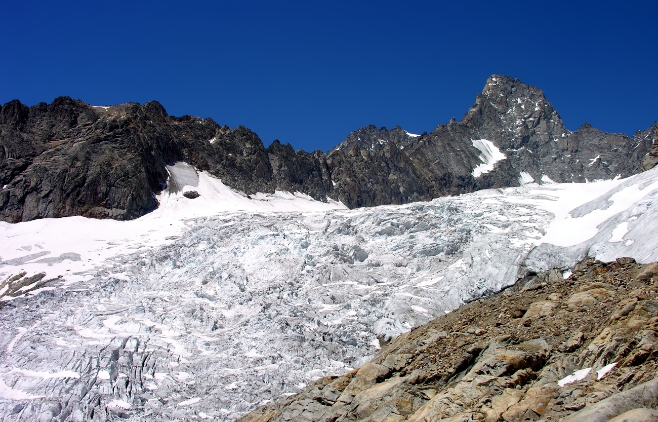 Il ghiacciaio di Di Pré de Bar - Alpi Graie - Italy